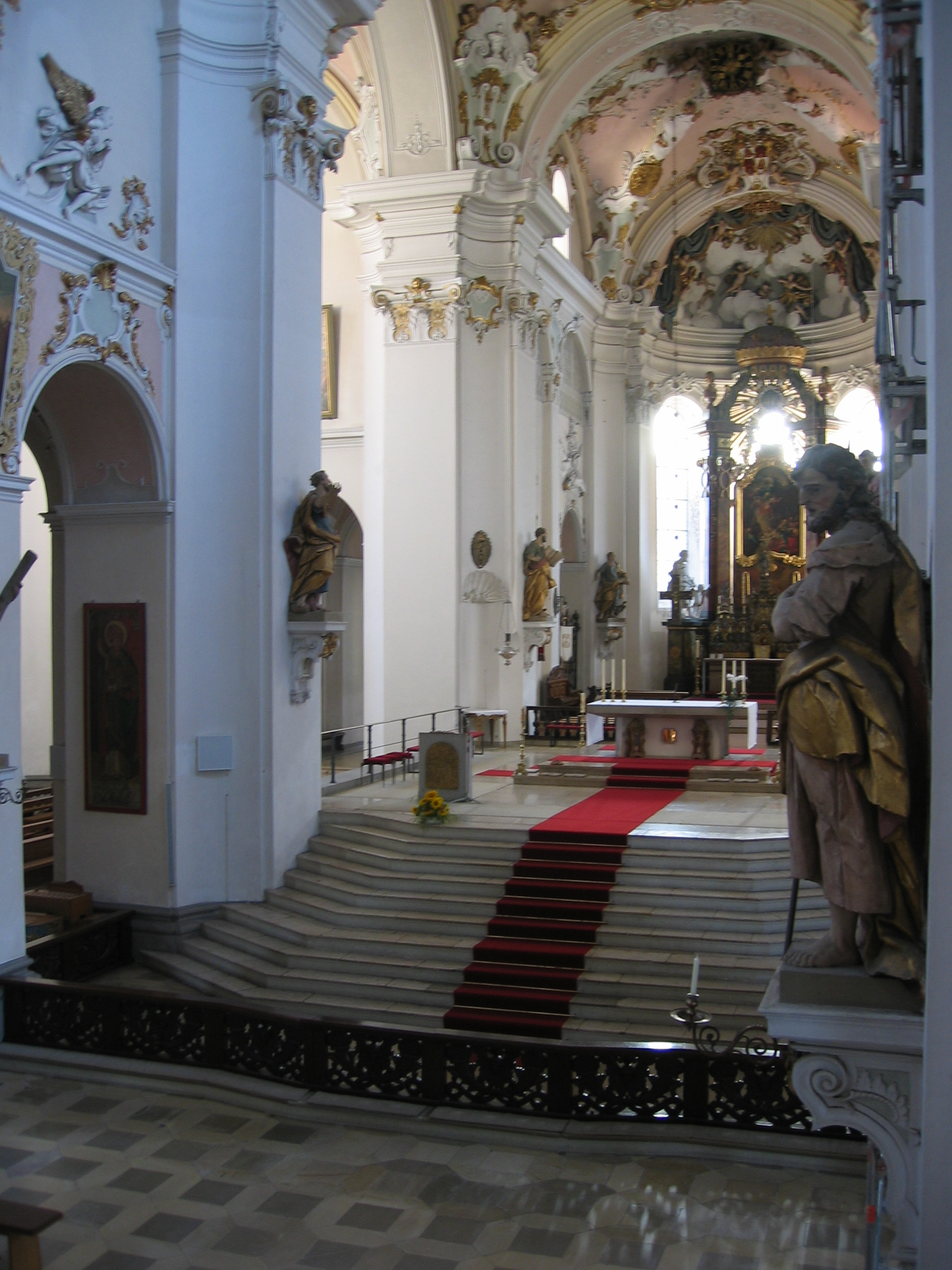 Innenraum der Basilika